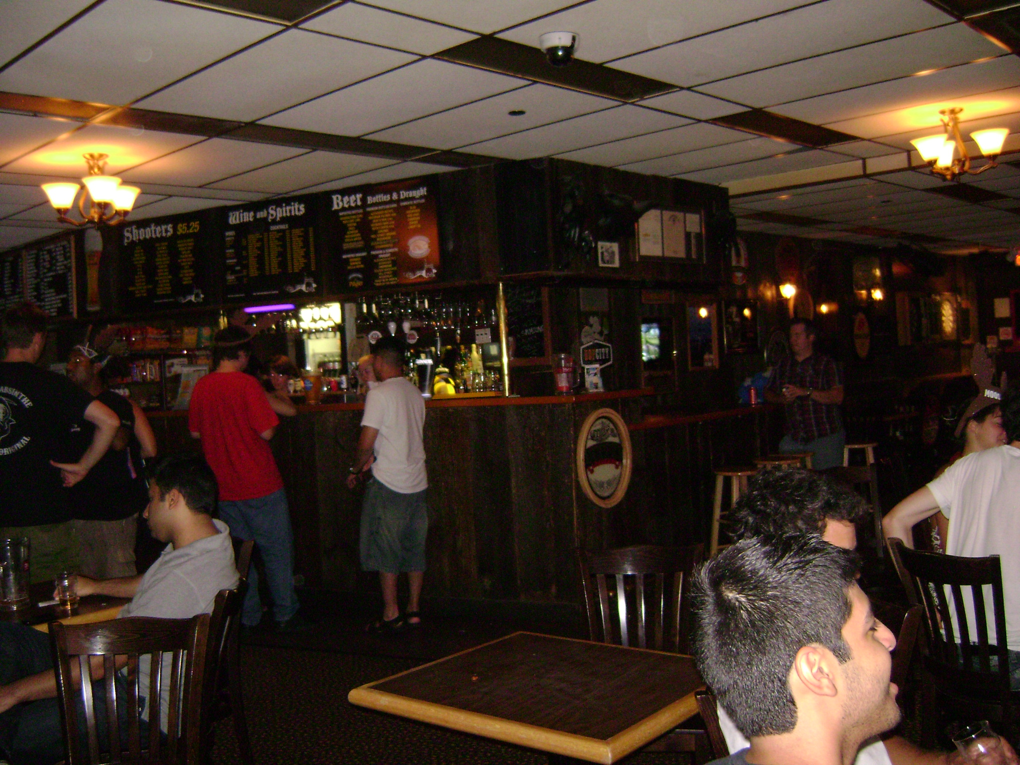 Pub dentro da Winters College, na York University, Toronto, Ontário, Canadá.